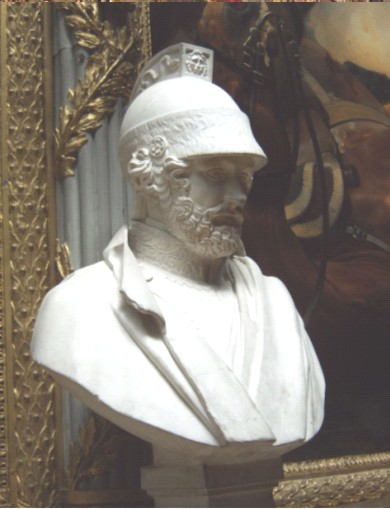 buste de la galerie des batailles du château de Versailles